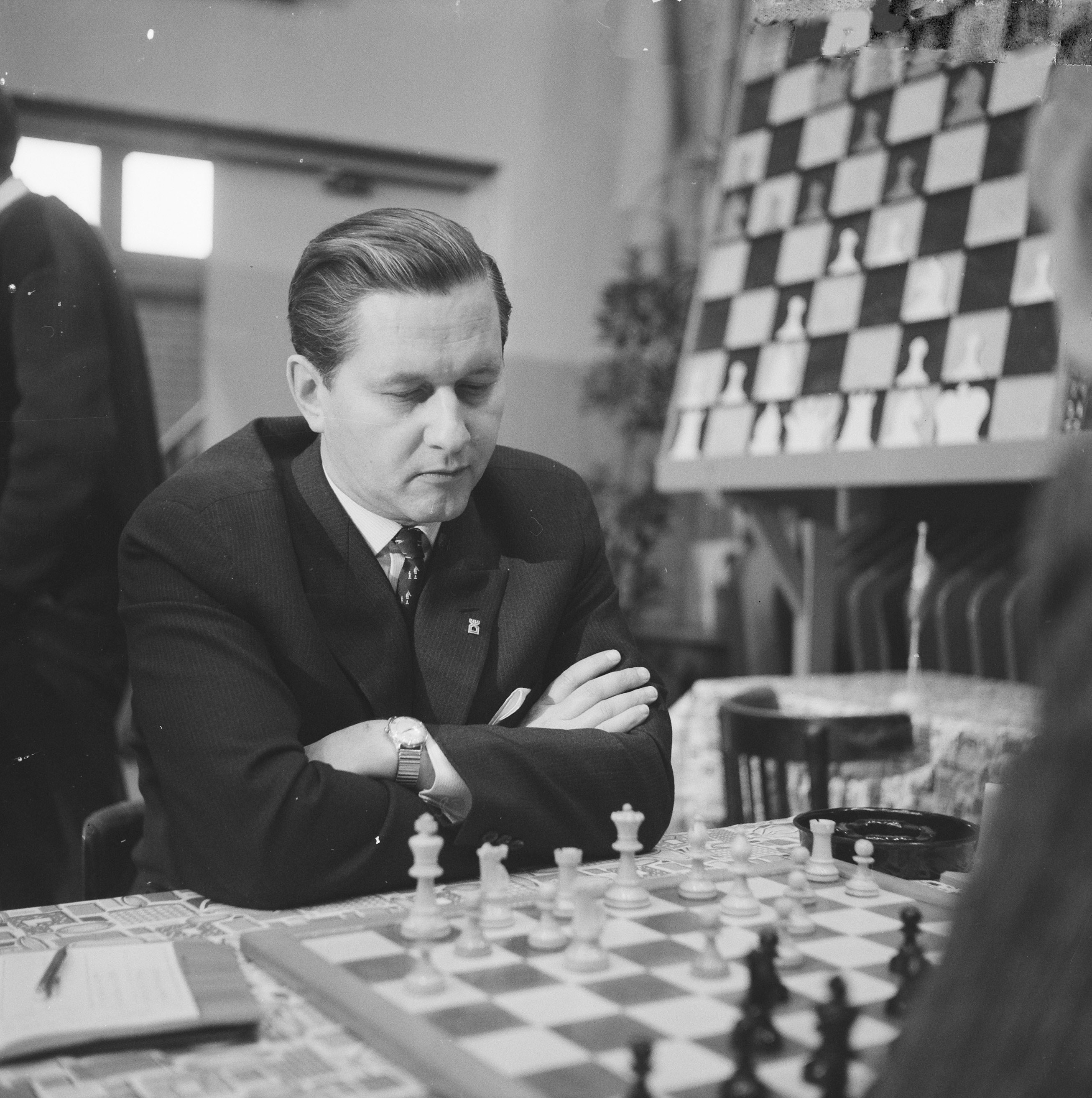 Collectie / Archief : Fotocollectie Anefo Reportage / Serie : [ onbekend ] Beschrijving : 26e Hoogovenschaaktoernooi te Beverwijk, P. Keres (USSR Datum : 8 januari 1964 Locatie : Beverwijk Trefwoorden : schaken Persoonsnaam : Keres, P. Instellingsnaam : Hoogovenschaaktournooi Fotograaf : Nijs, Jac. de / Anefo Auteursrechthebbende : Nationaal Archief Materiaalsoort : Negatief (zwart/wit) Nummer archiefinventaris : bekijk toegang 2.24.01.03 Bestanddeelnummer : 915-9231